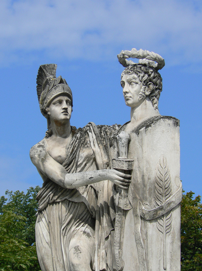 Statues sommitales provenant de l'ancienne Fontaine Desaix de la place Dauphine (Paris) et transportées à Riom (Puy-de-Dôme) en 1906. La France (allégorie) couronne de laurier le général Desaix mort à la bataille de Marengo en 1800. Sculpteur Augustin Félix Fortin (1802-1803).